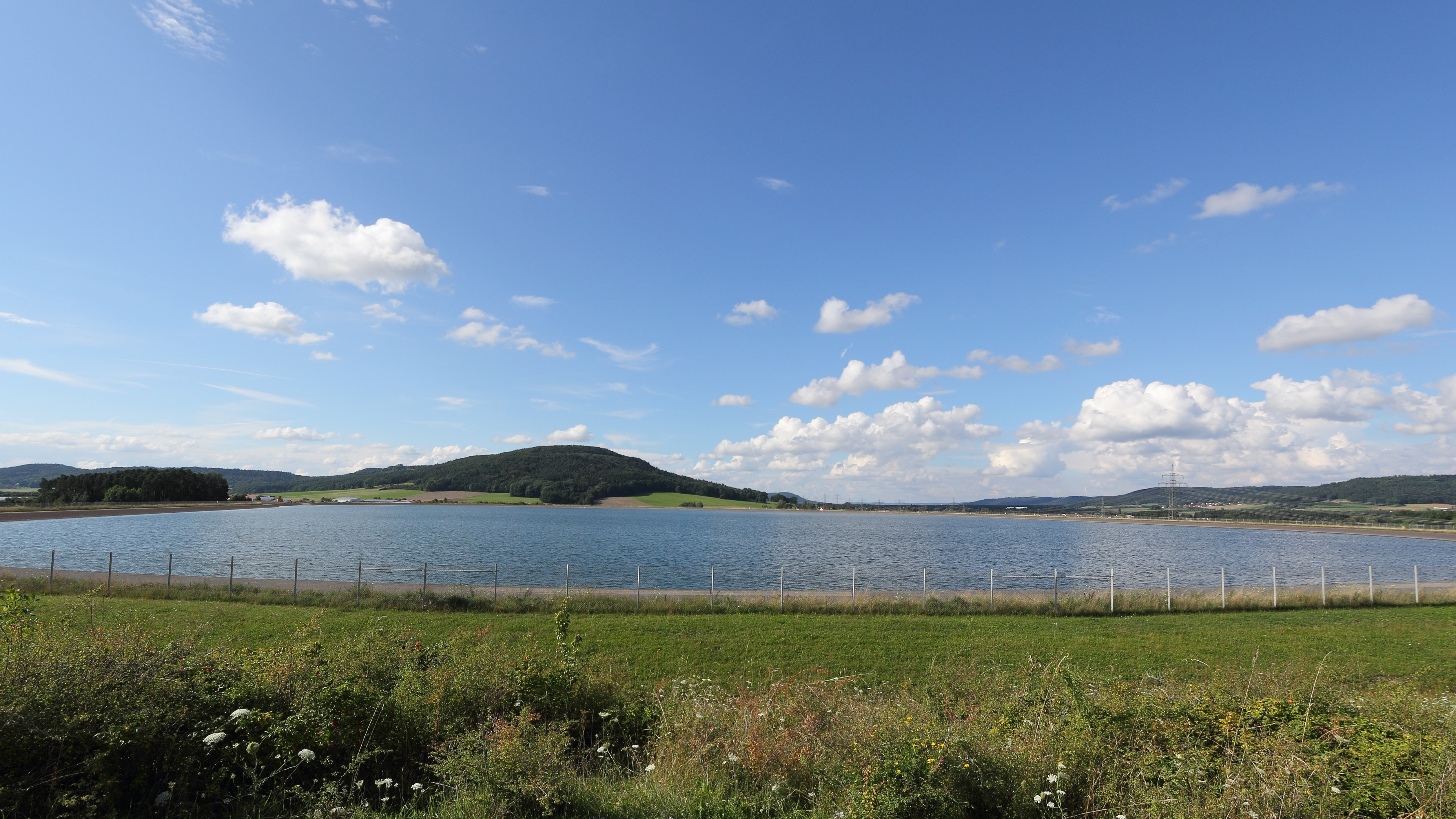 Mühlhausen (Oberpfalz) - Pumpspeicheranlage Dürrloh